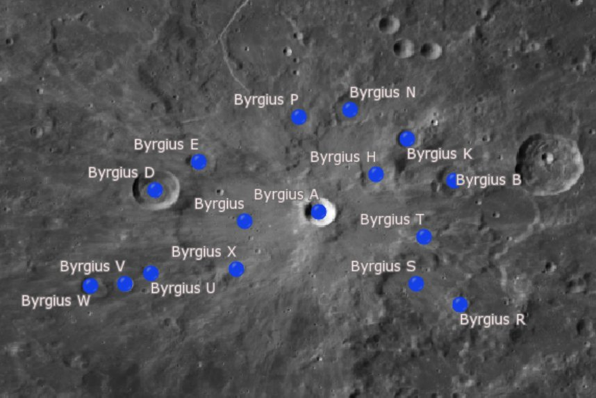 Cráter lunar Byrgius. Cráteres satélite. (Imagen LRO)